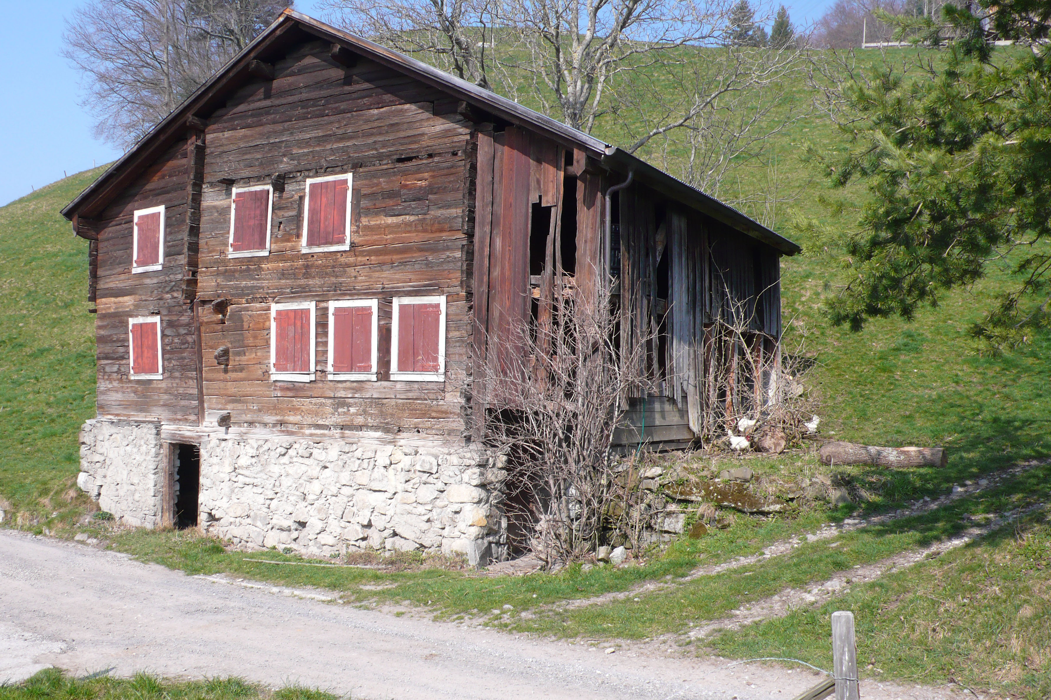 Haus Tannen, Morschach: Zweigeschossiger Blockbau, 1341 erbaut. Gilt als eines der ältesten Holzhäuser europaweit. Der auf einem Bruchsteinsockel liegende Holzbau ist mit stehenden Brettern verkleidet. Mit Ausnahme der im 19. Jahrhundert angebauten Ost-Laube, ist die ursprüngliche mittelalterliche Form erhalten, was aussergewöhnlich ist. Die Stiftung Ferien im Baudenkmal des Schweizer Heimatschutzes hat das Holzhaus Tannen 2017 unter denkmalpflegerischer Begleitung und Wahrung der historischen Substanz renoviert und vermietet es als Ferienhaus.